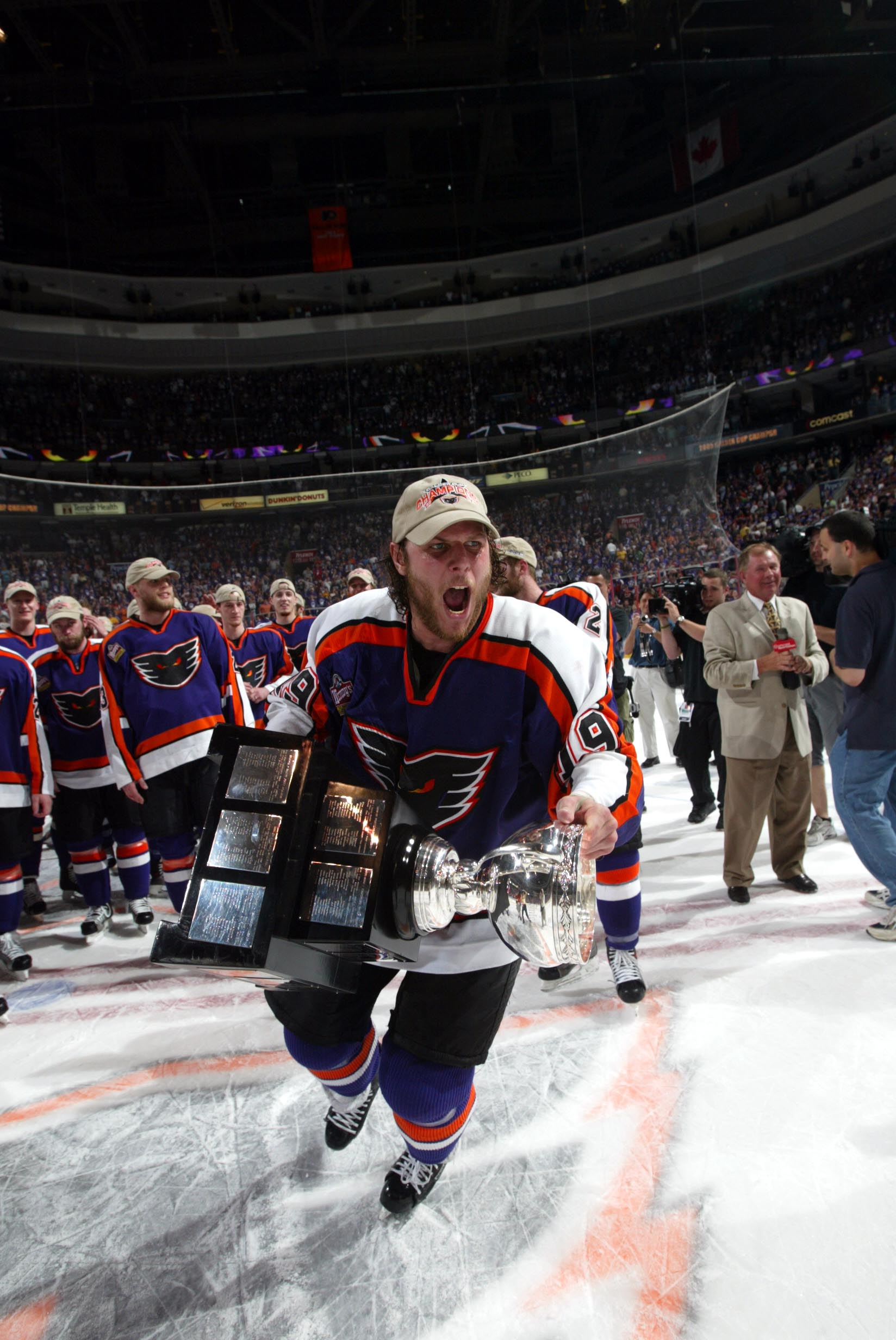 Photo: Bruce Bennett/AHL